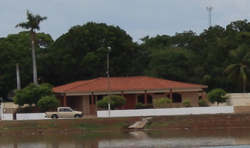 Vista de uma casa residencial com teto de formato de tacaniça.